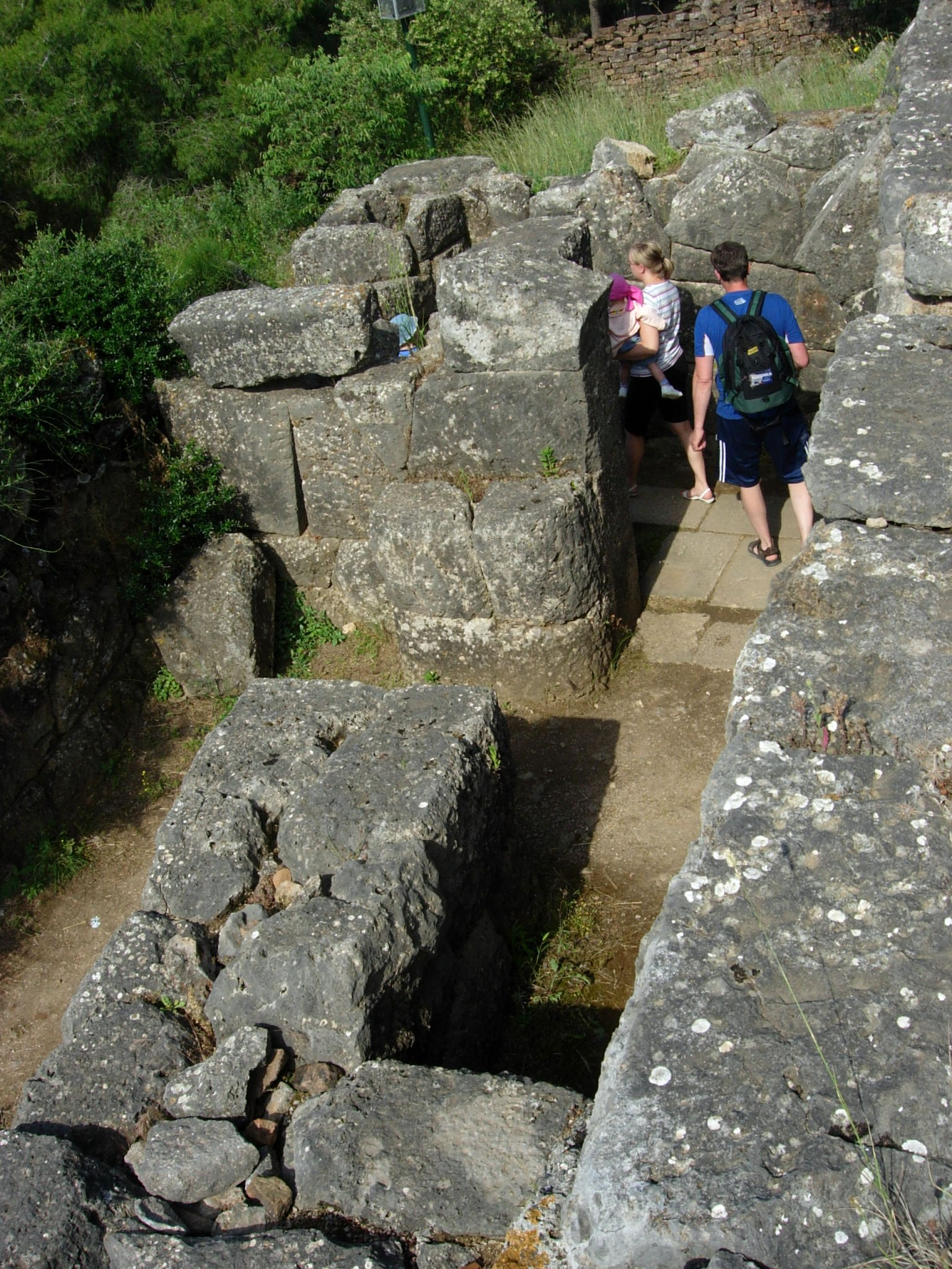 Nekromanteionin oraakkeli.